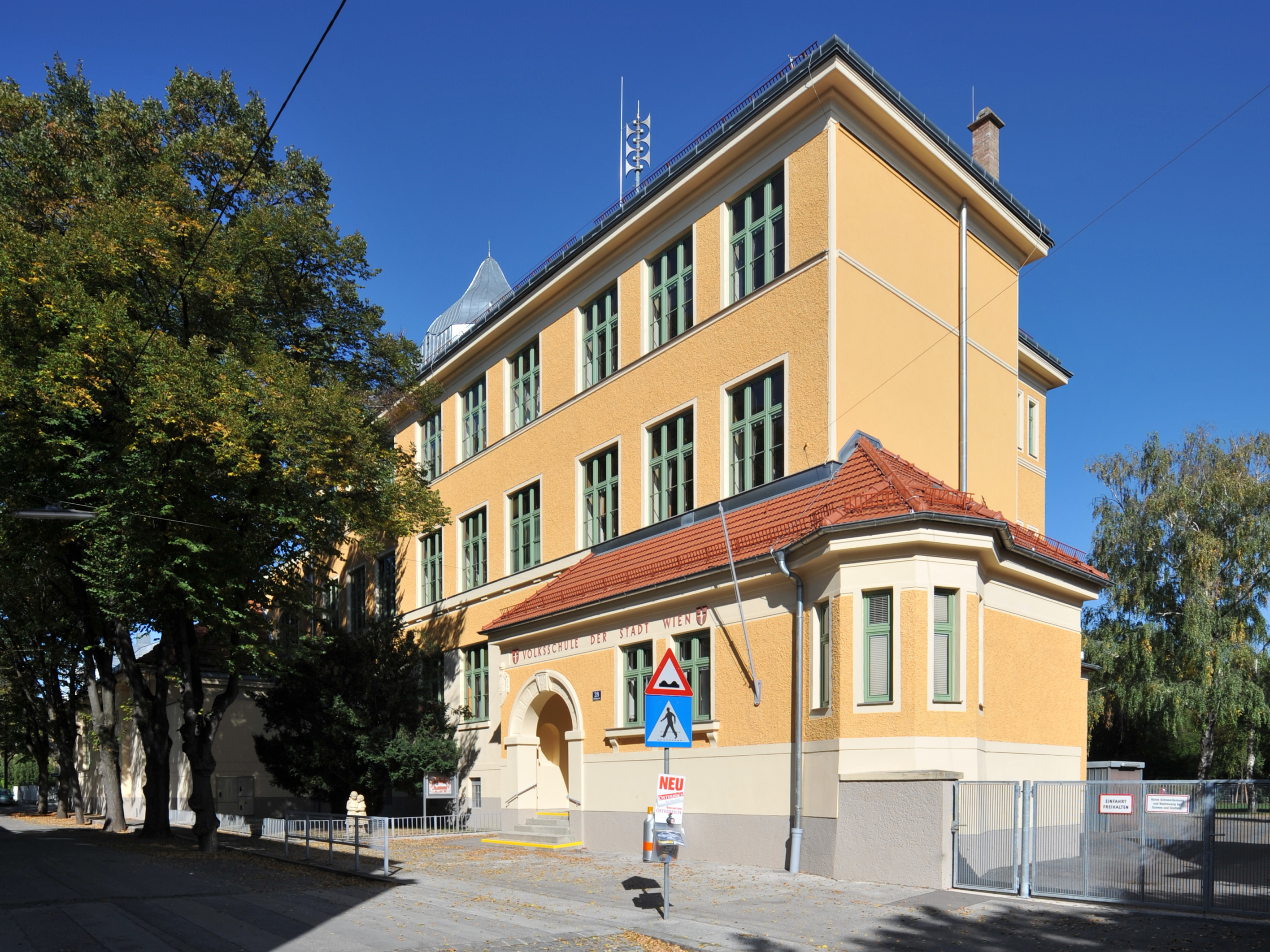 Volksschule Pülslgasse